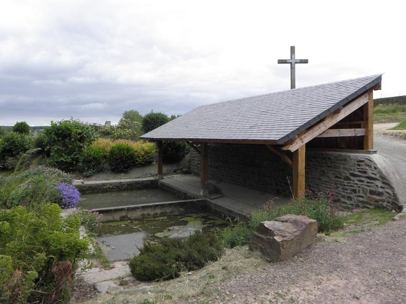 Lavoir de la fontaine Saint-Laurent au Crouais (35).